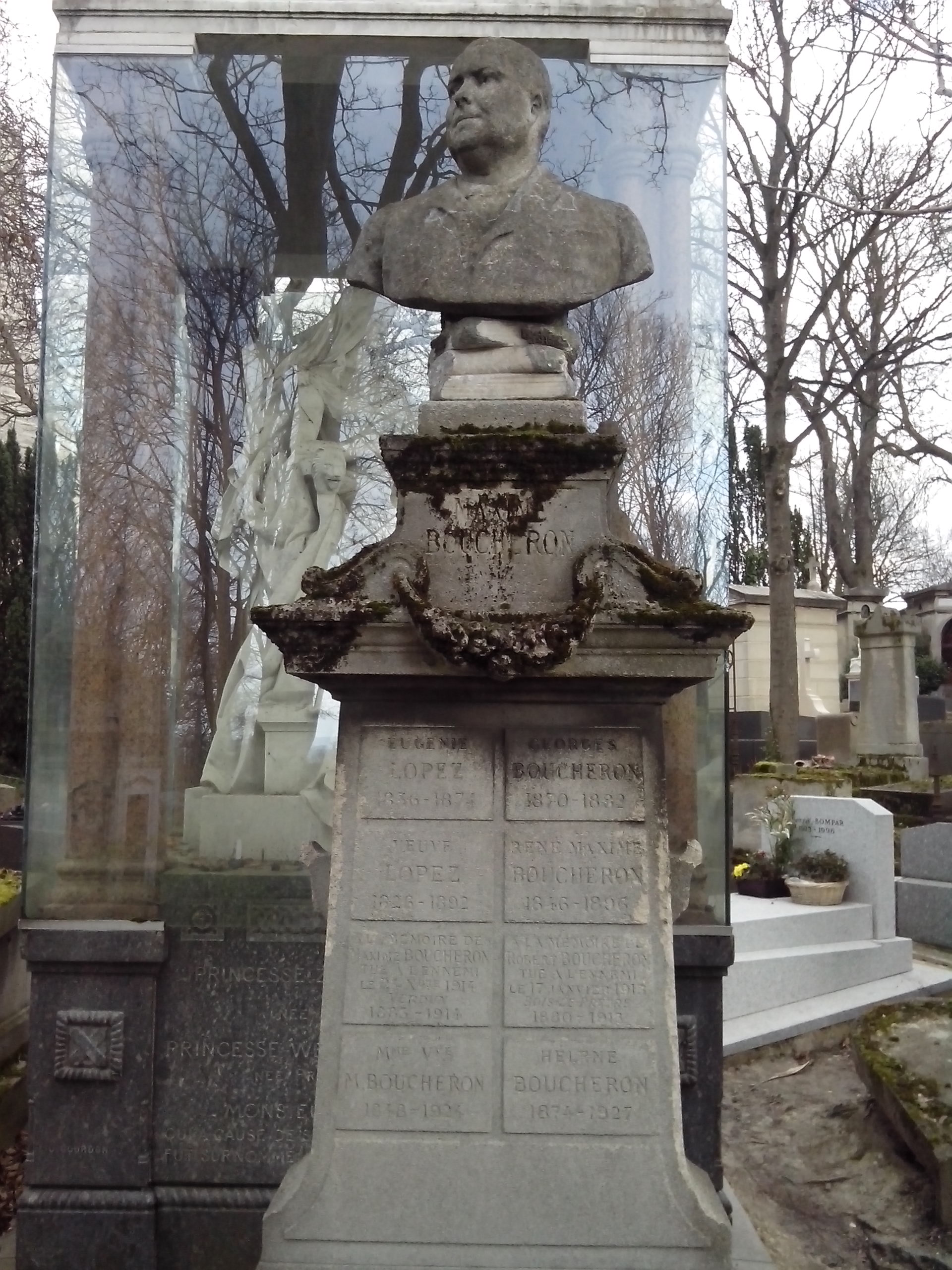 Vue d'ensemble